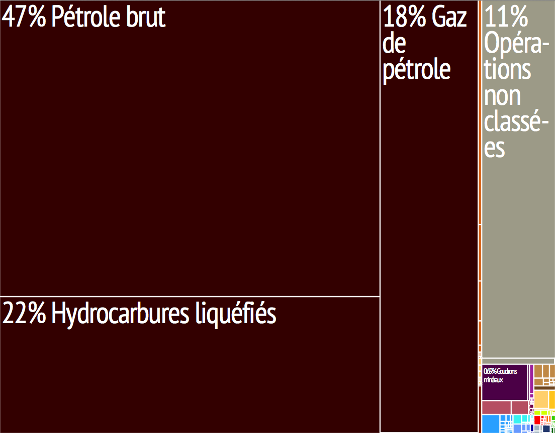 Représentation graphique des exportations de produits du pays dans 28 catégories de couleur. Chaque case de couleur représente un produit et sa taille est proportionnelle à la part des exportations totales du pays que le produit représente.